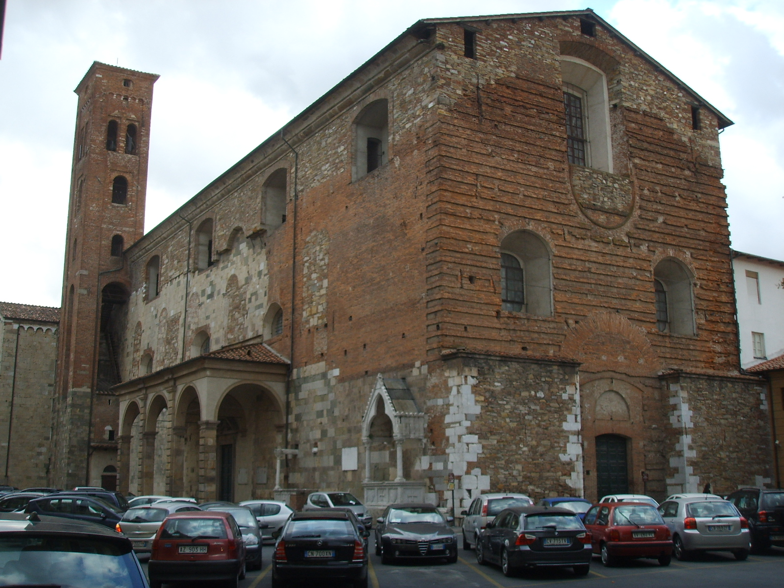 Chiesa di san romano, lucca